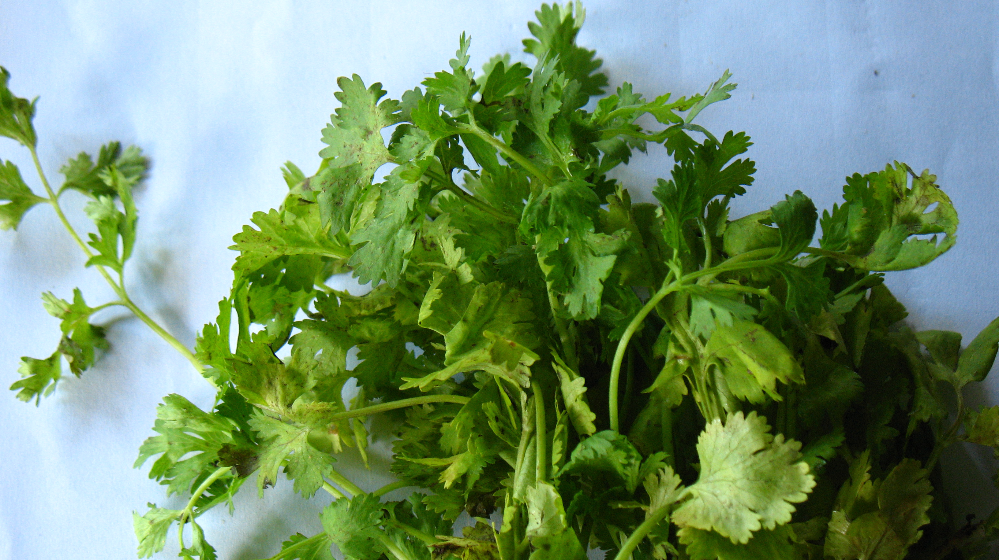 പച്ച കൊത്തമല്ലി